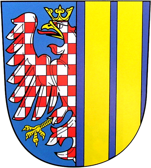 Znak Veverské Bítýšky